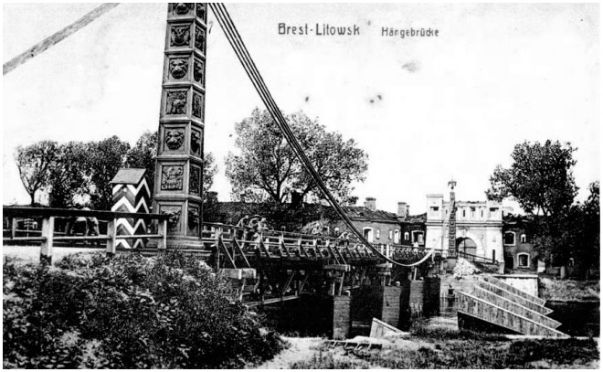 Цярэспальская брама. 1915—1918 г.